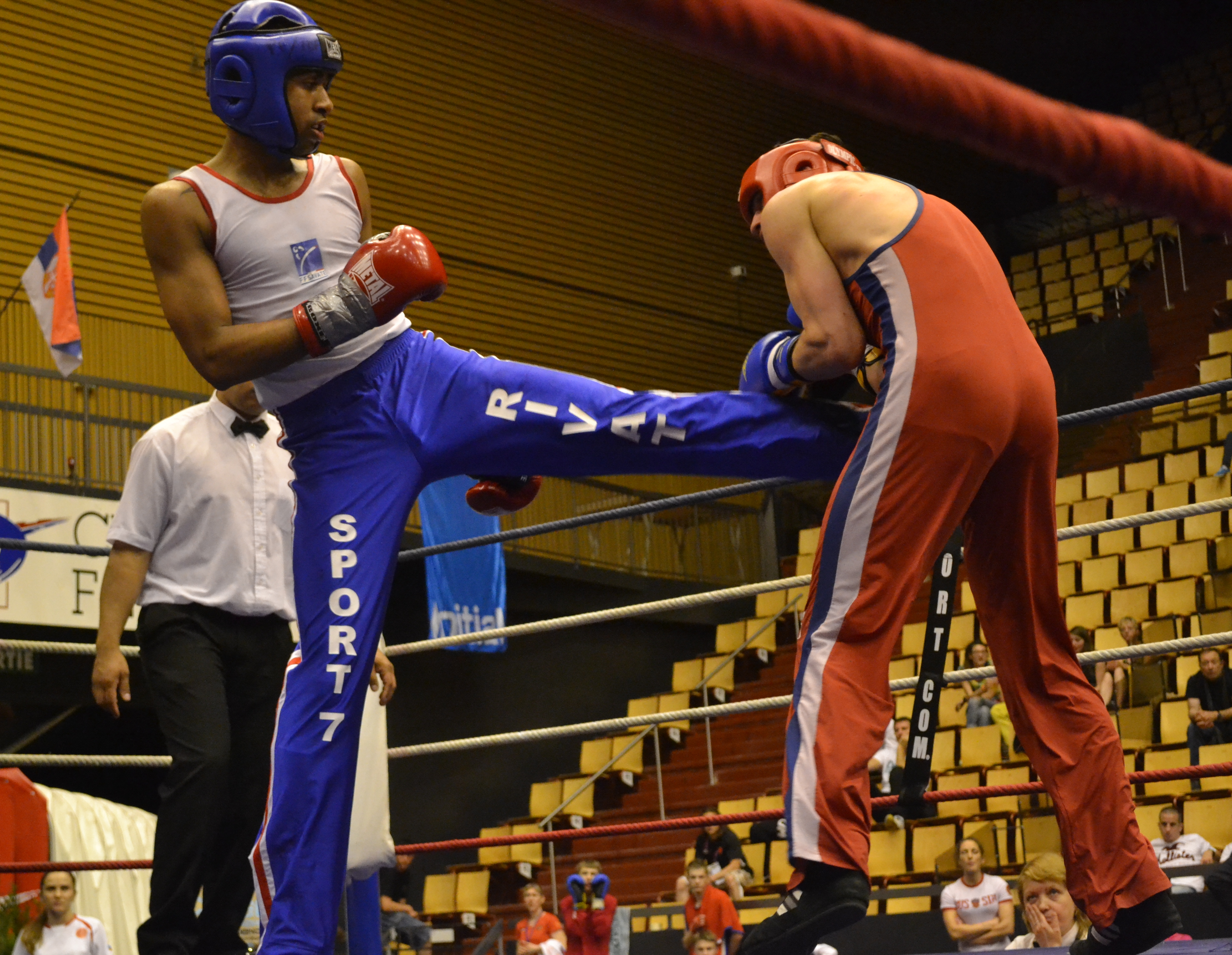 Championnat Monde (qualif) 2013 - M65